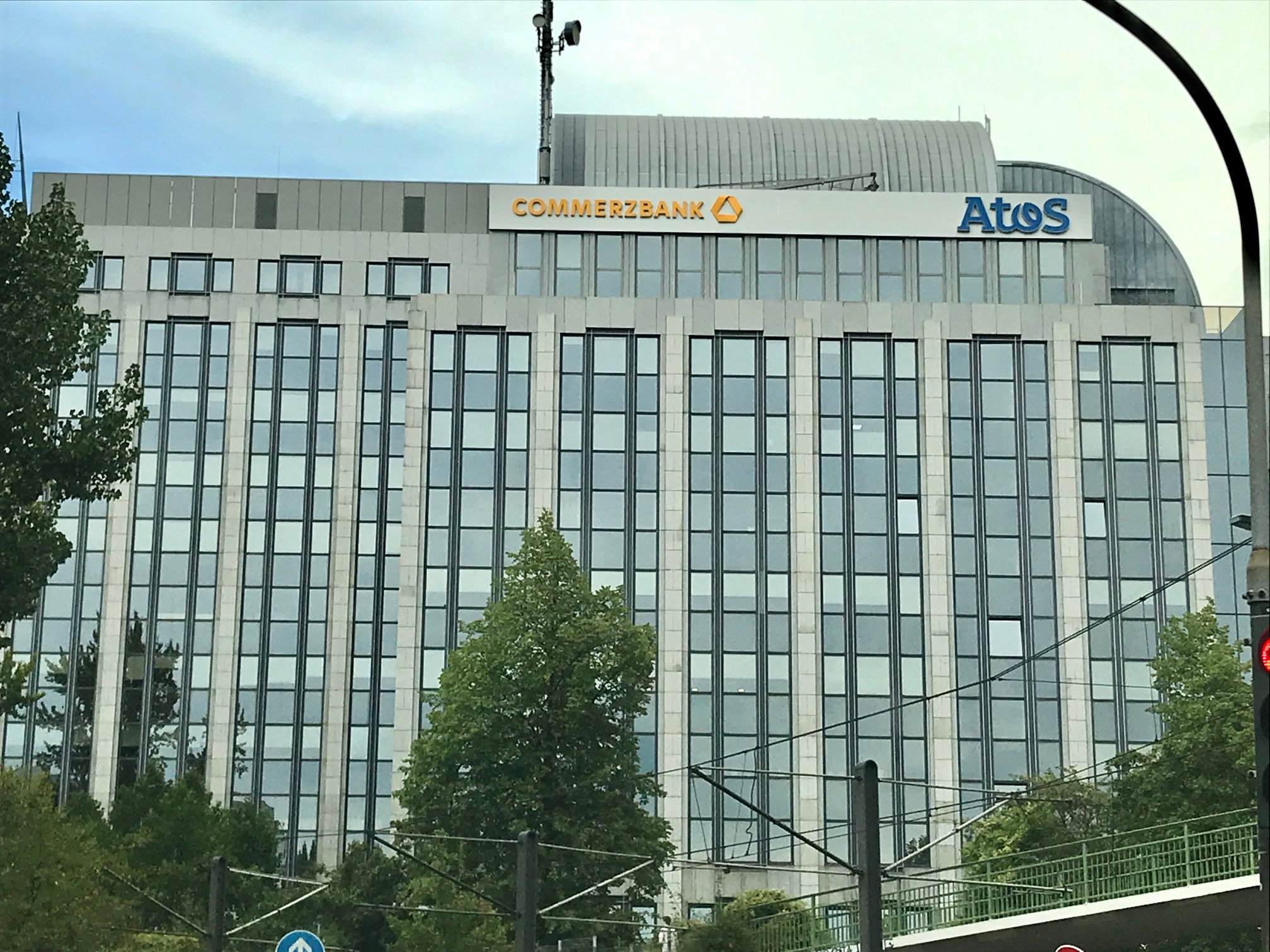 Commerzbank Düsseldorf